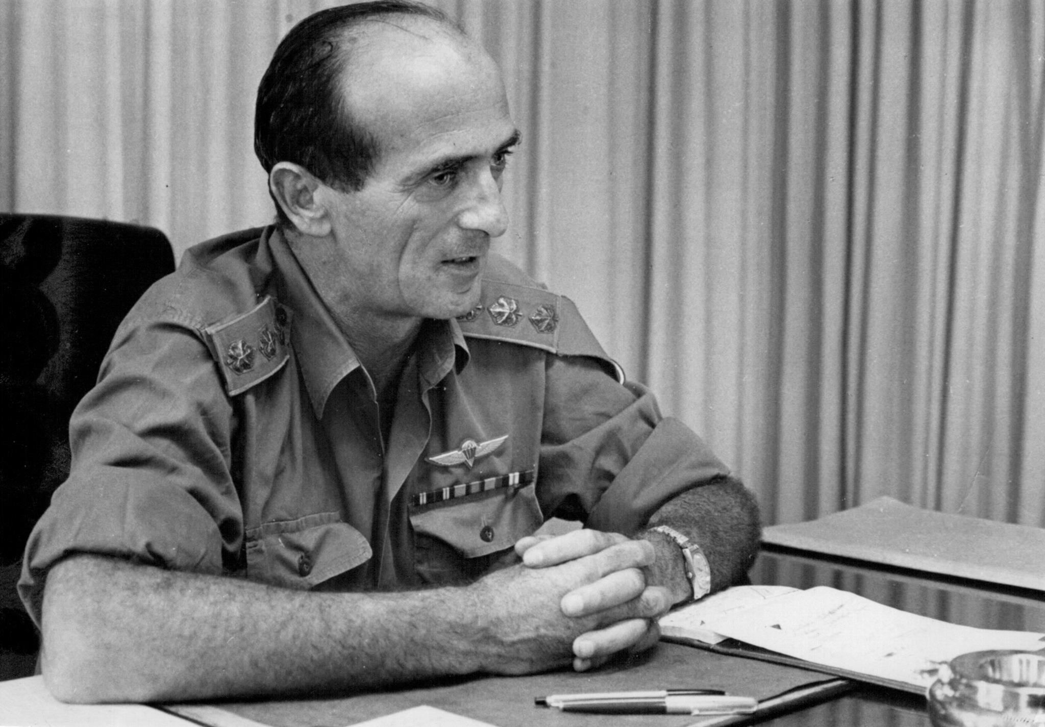 .תת אלוף שלמה אמבר. התמונה צולמה בסוך שנות השישים תחילת שנות השבעים של המאה העשרים